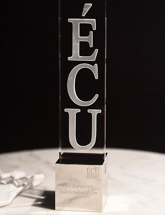 Prix d'ÉCU 2019